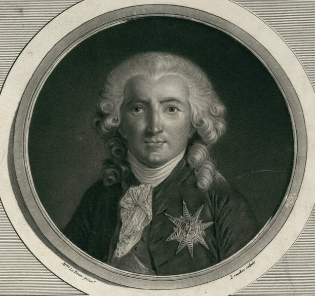 Calonne, contrôleur général des finances, en 1787